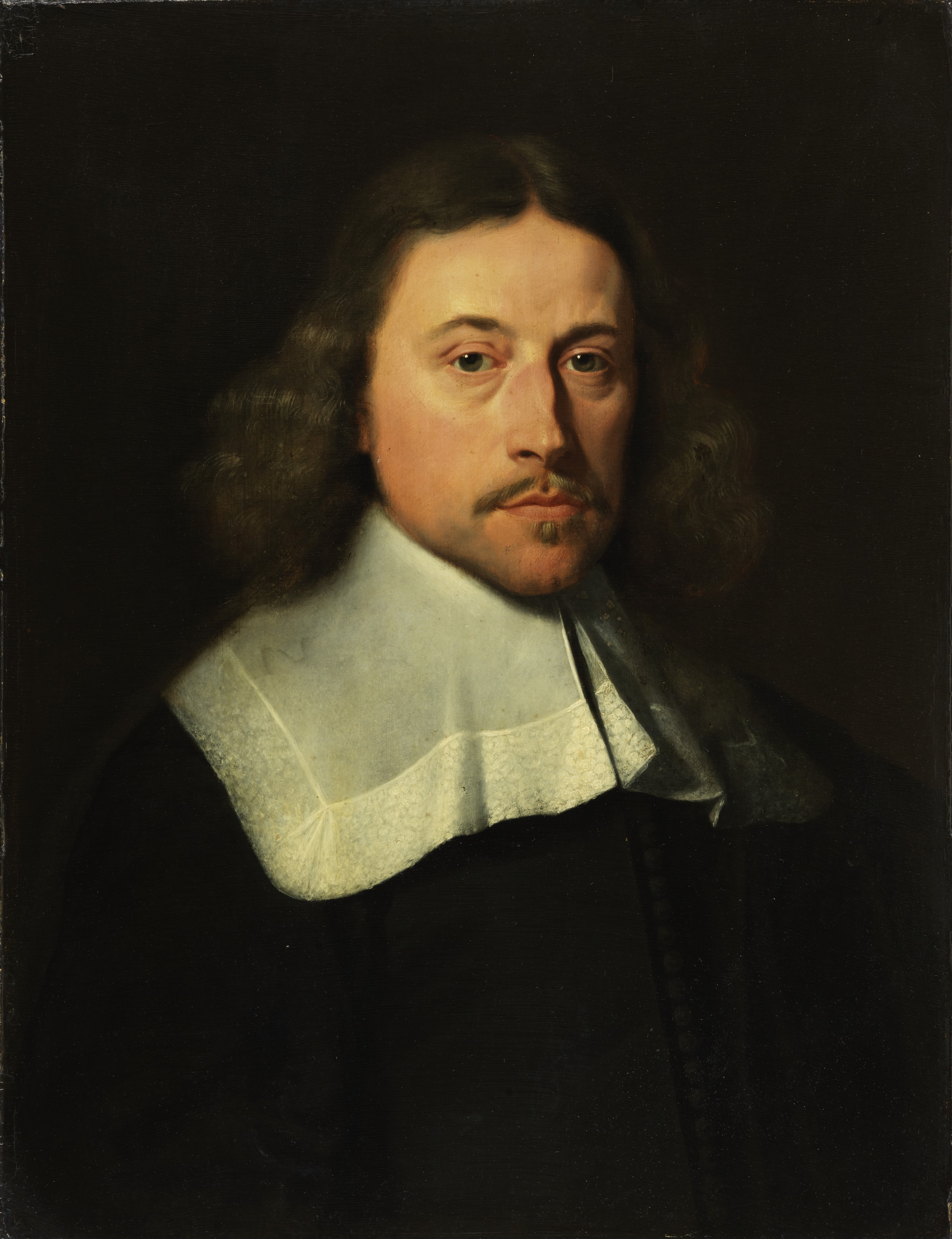 schilderij ( Jacob van Reesbroeck ( Museum Plantin-Moretus